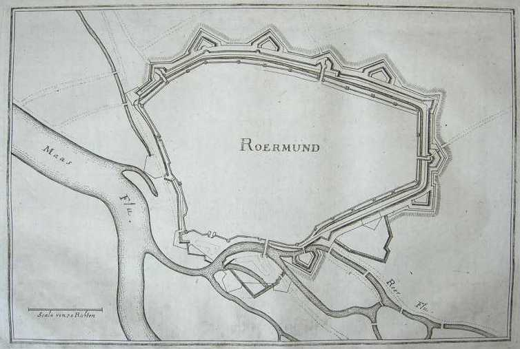 Stadtbefestigung Roermond, Kupferstich 1650